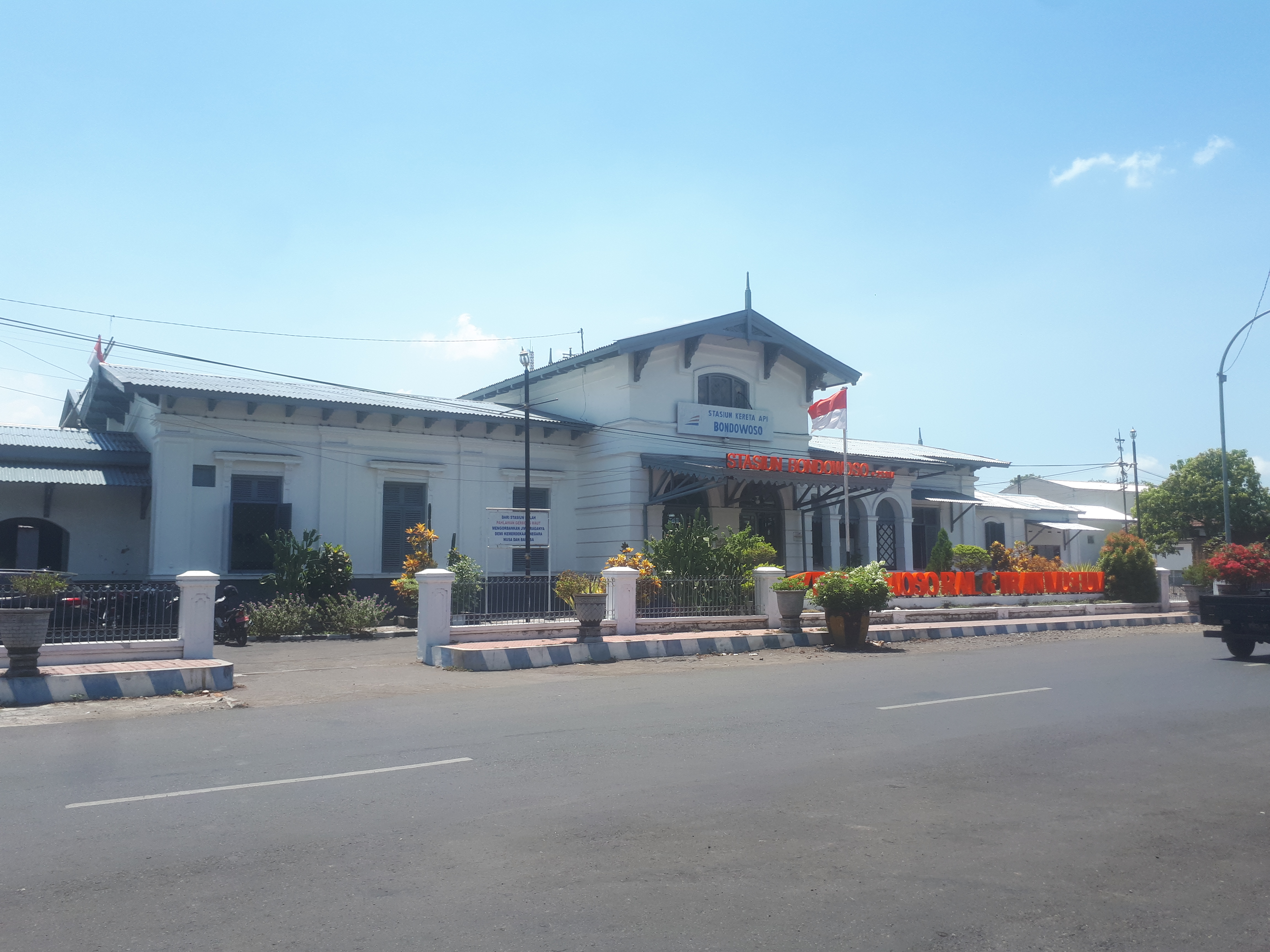 Bagian depan Museum Stasiun Bondowoso akhir 2019. Bekas stasiun ini dijadikan museum oleh PT. Kereta Api Indonesia yang bekerjasama dengan Pemerintah Kabupaten Bondowoso pada 17 Agustus 2016.